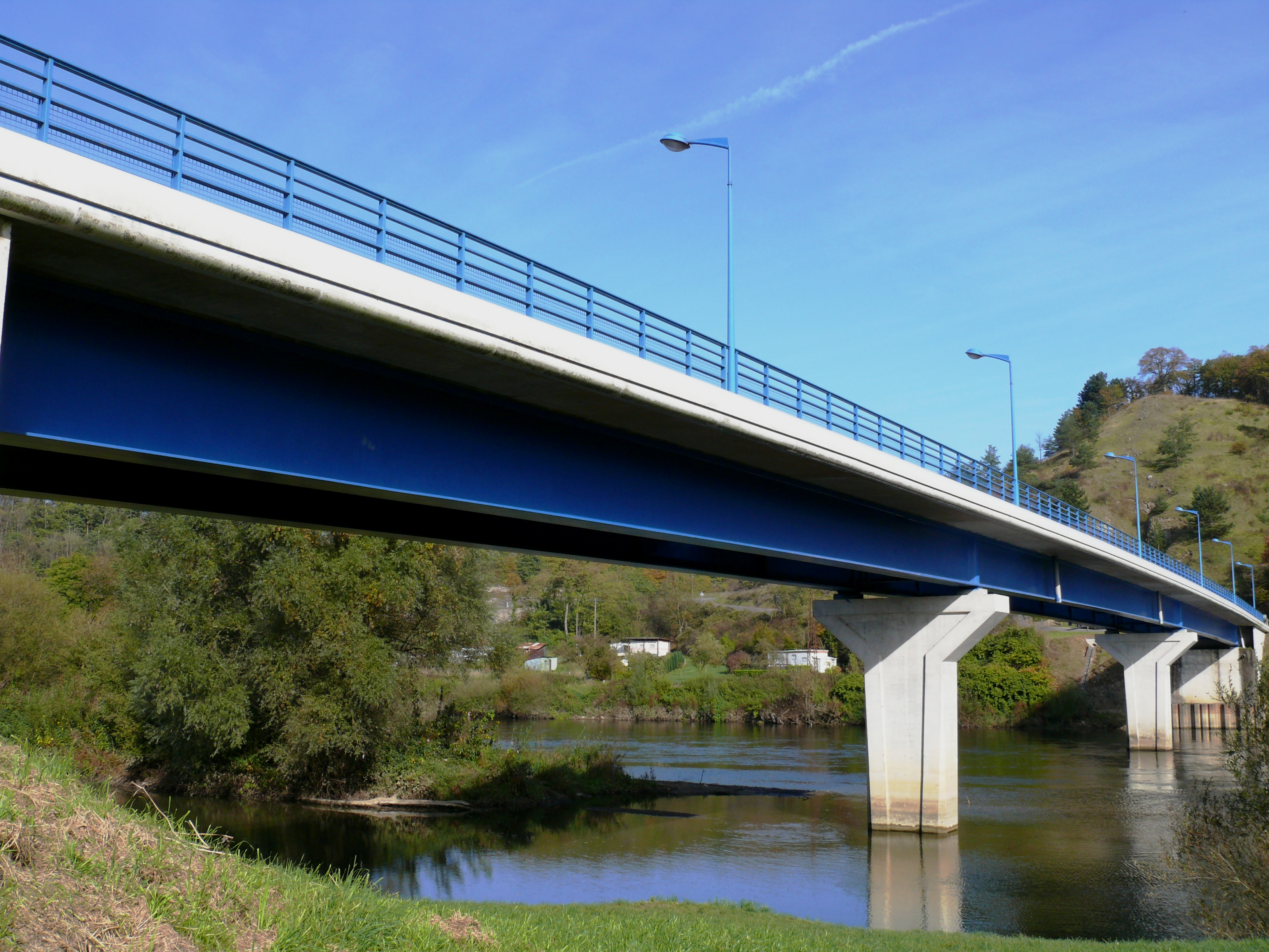 Ham-sur-Meuse - Pont sur la Meuse (CD46d) reconstruit en 1997